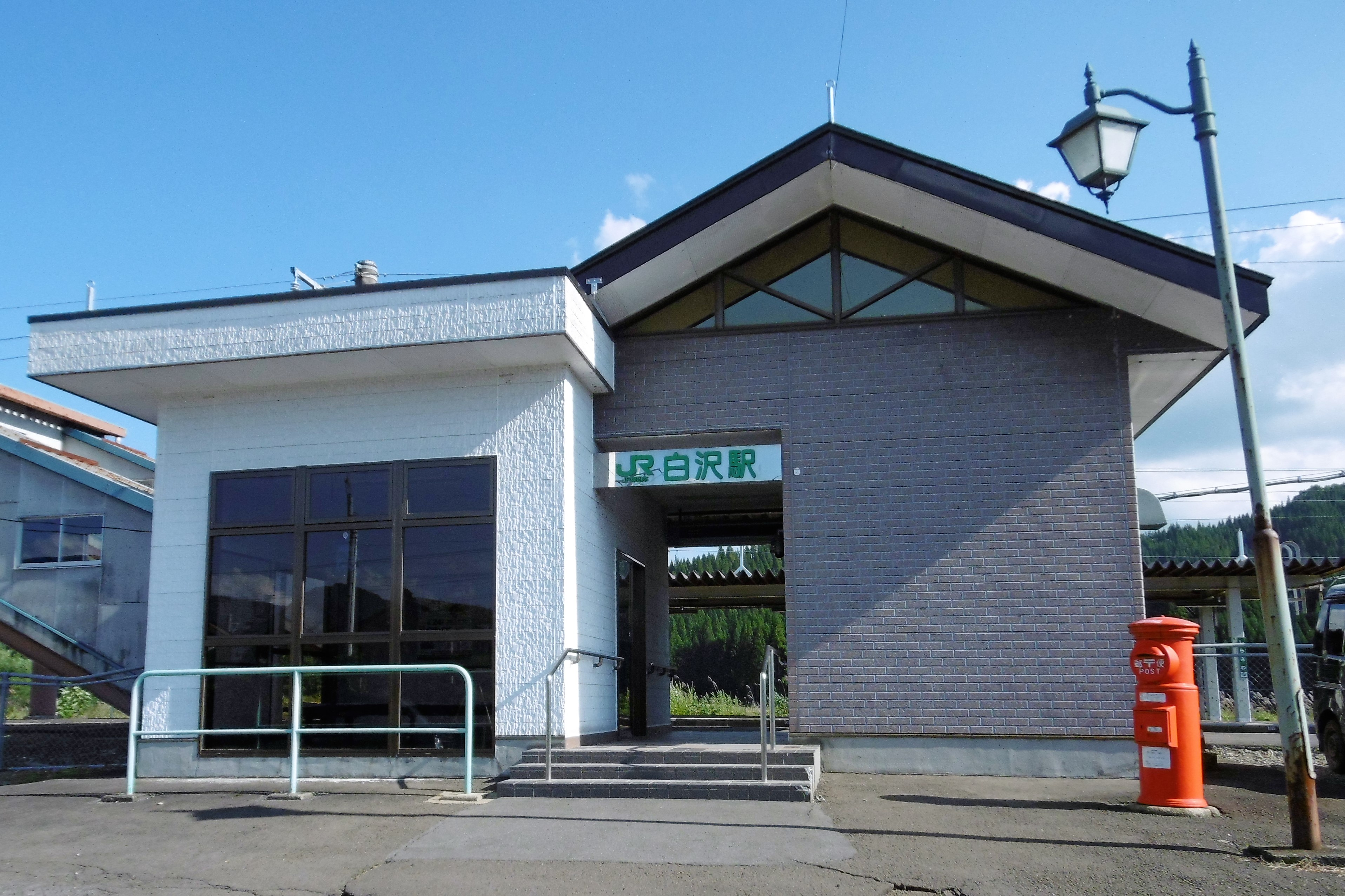 JR白沢駅 :秋田県大館市白沢